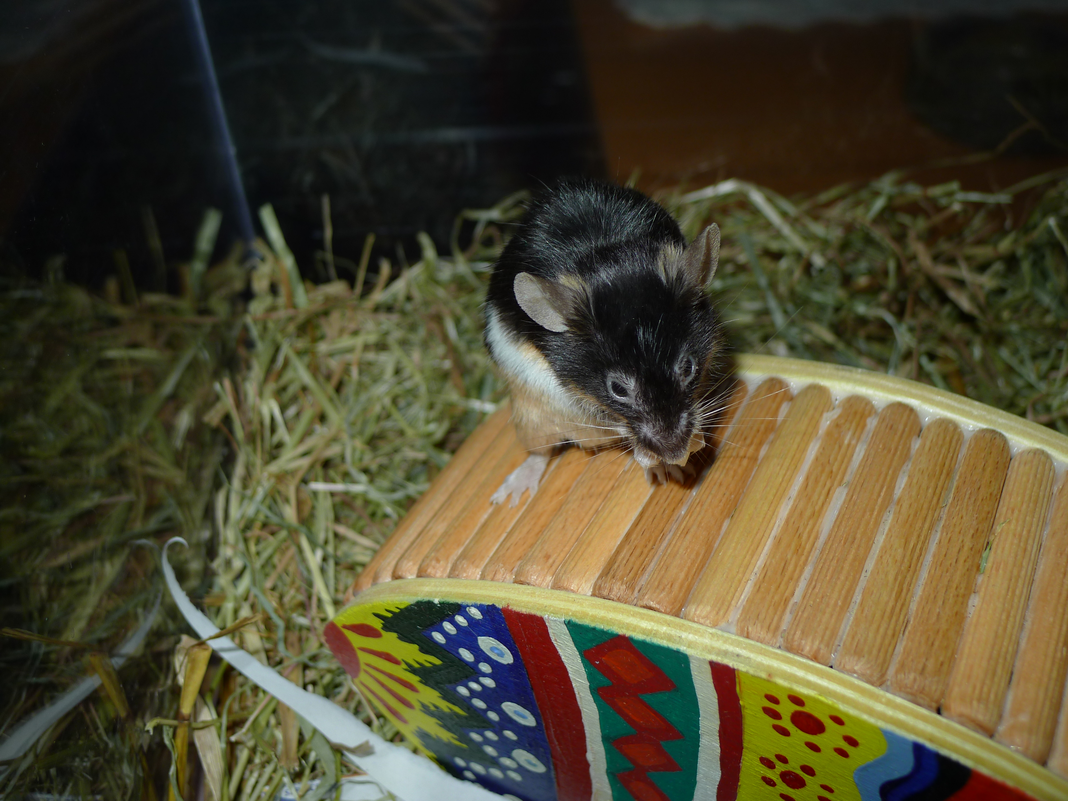 fressende Farbmaus